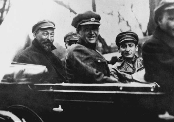 Ф. Э. Дзержинский, В. А. Балицкий, С. Ф. Реденс и Иосиф Михайлович Блат в автомобиле. Харьков.